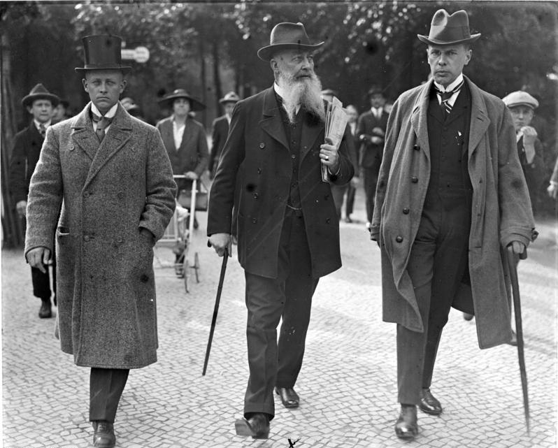 Groß-Admiral von Tirpitz gestorben! Aufnahme des Groß-Admiral von Tirpitz, welcher in einem Sanatorium im Isar-Tal/Bayern an Herzlähmung im Alter von 81 Jahren gestorben ist.